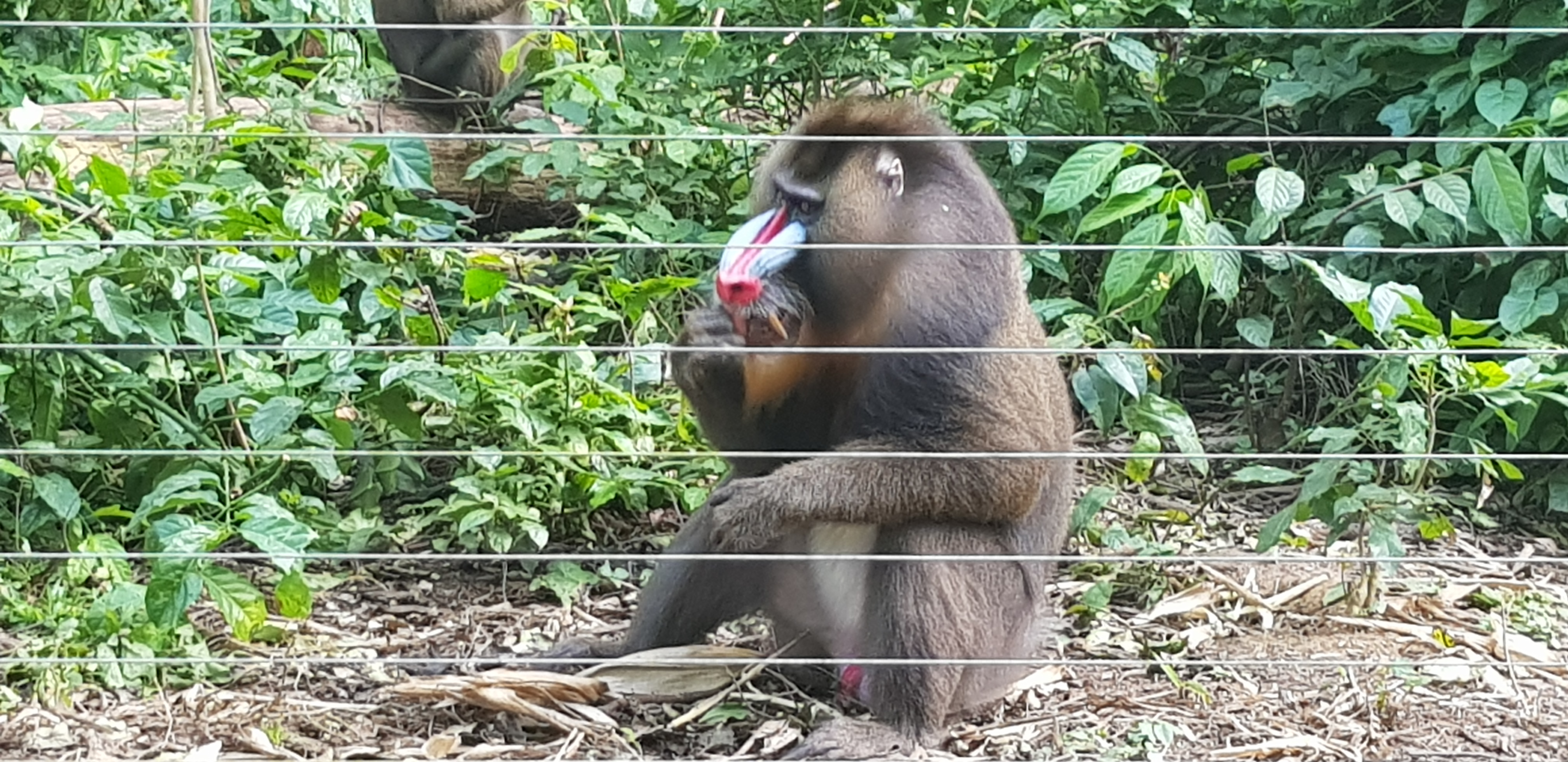 Primate Reserve sanctuary Mefou, located 5km from Mbalmayo, near Yaoundé